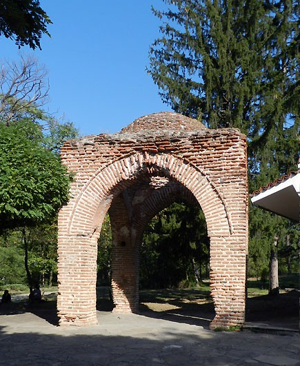 тюрбето на османския пълководец Лала Шахин в парка Тюлбето, Казанлък